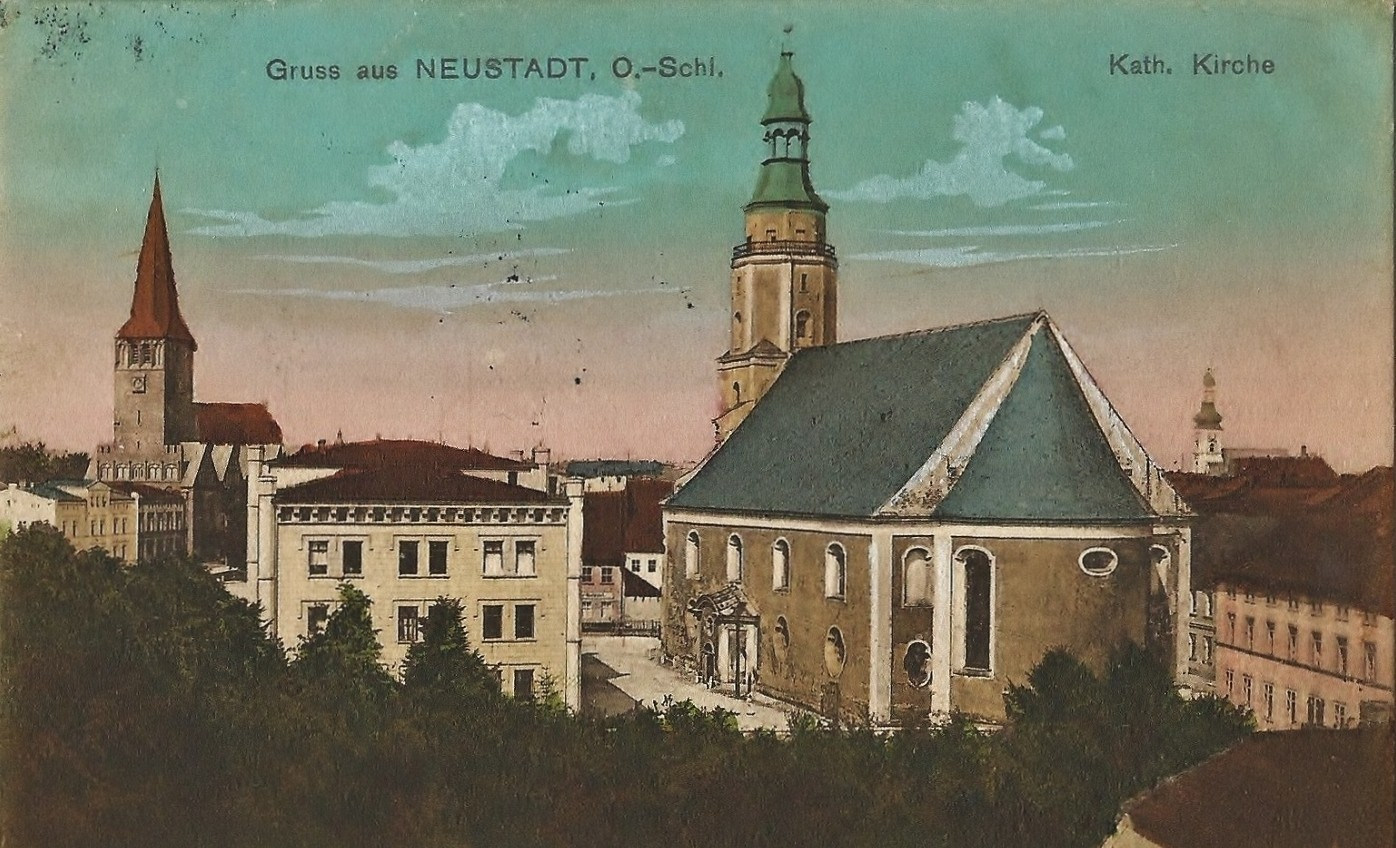 Prudnik - Kościół św. Michała Archanioła, Publiczne Gimnazjum nr 1, Kościół ewangelicki. , w głębi Kościół św. Piotra i Pawła